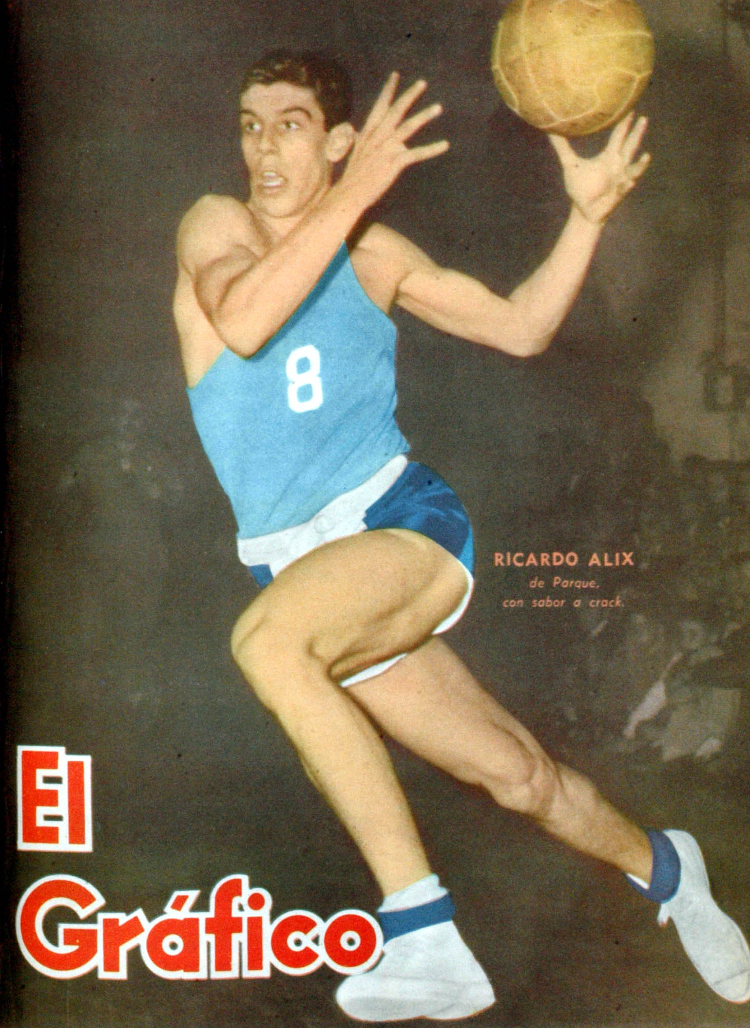 El Grafico del 05 de Julio de 1957. Edicion 1973